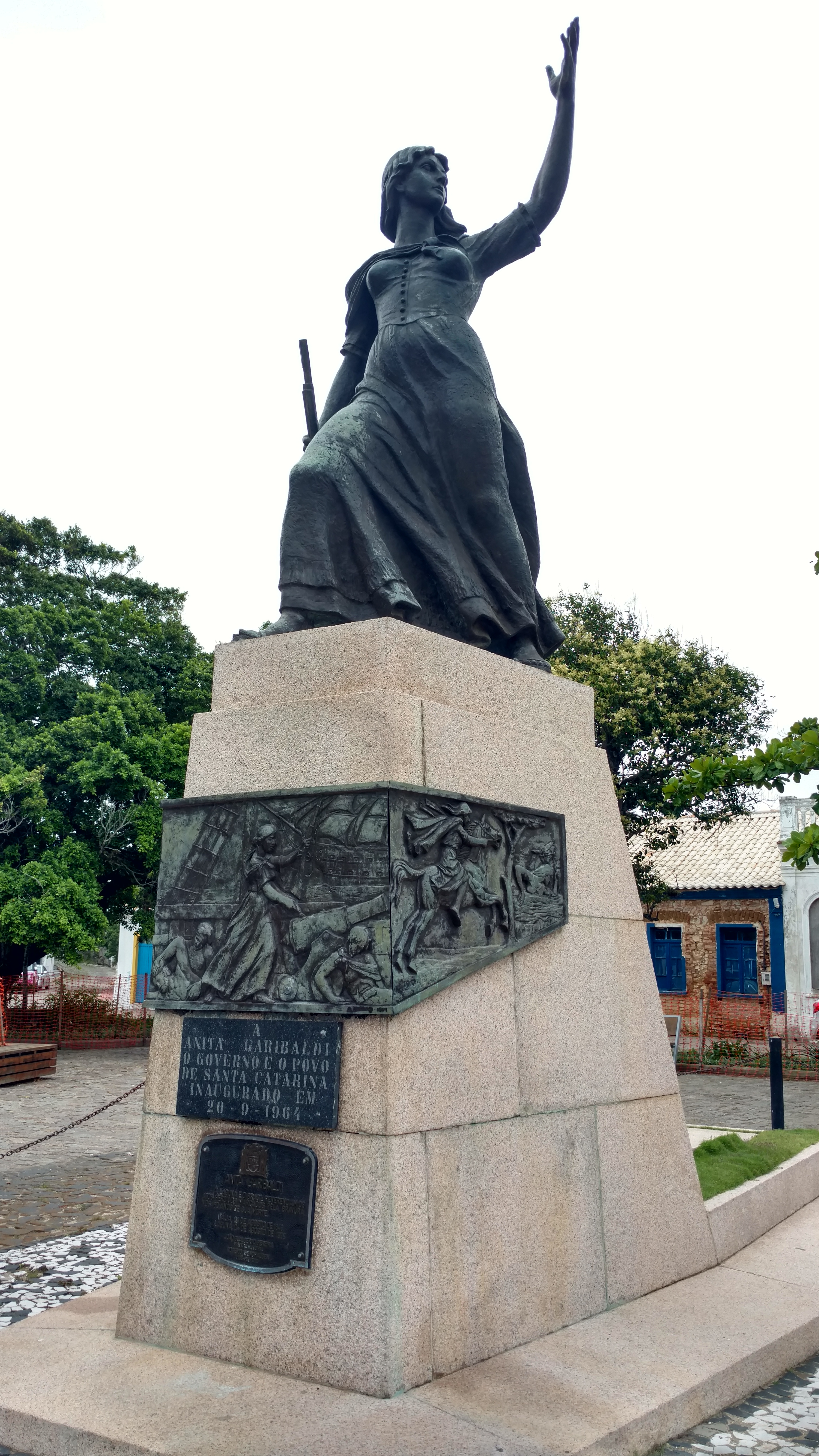 Statue of Anita Garibaldi, Laguna, Santa Catarina, Brazil.